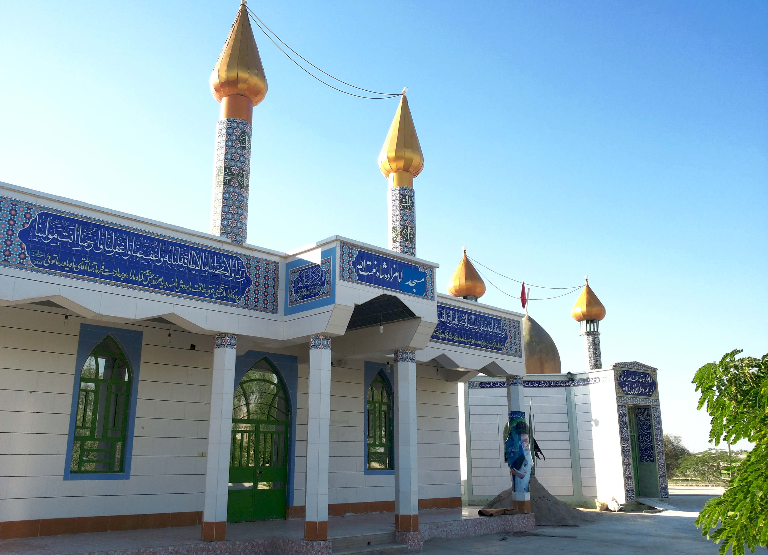 مکان زیارتی تفریحی امامزاده شاه نعمت الله